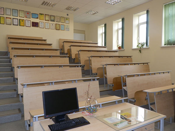 Gimnazijos auditorija